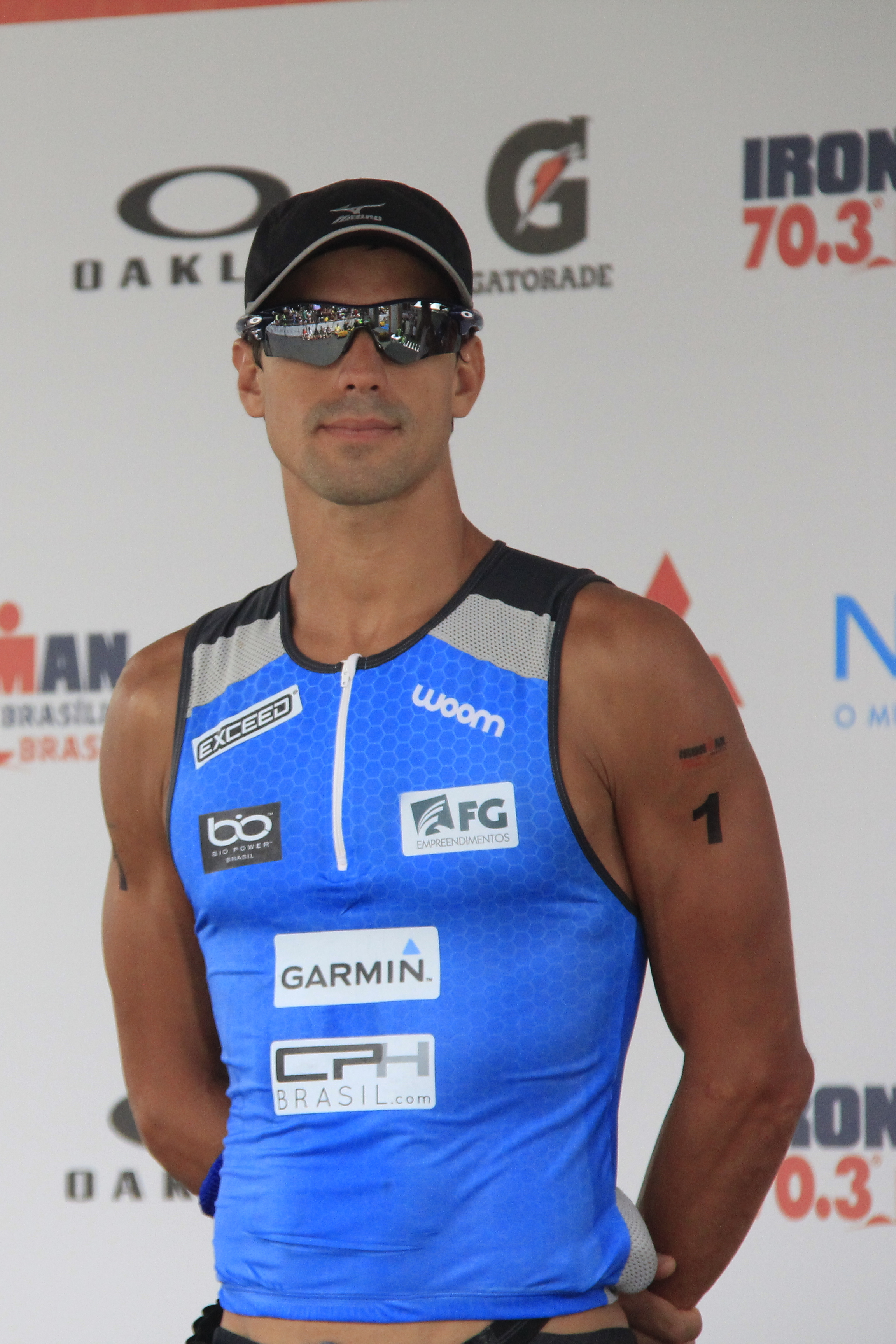 Igor Amorelli - Ironman 70.3 Brasilia 2014